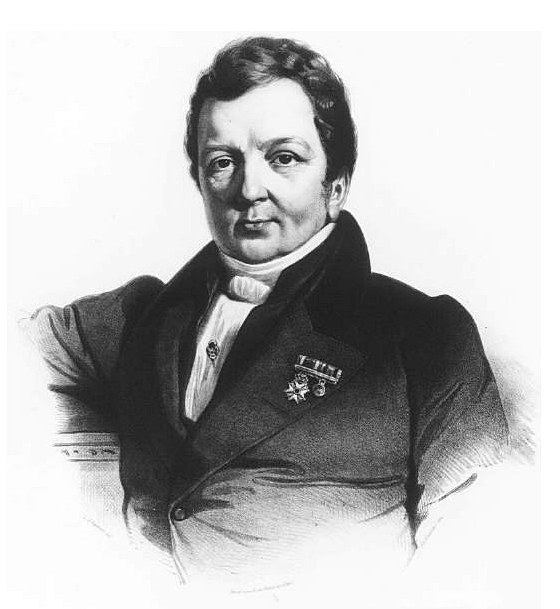 Jonkheer Gerrit Lodewijk Hendric Hooft, Burgemeester van Loosduinen (1813-1817) en van Den Haag (1843-1858)